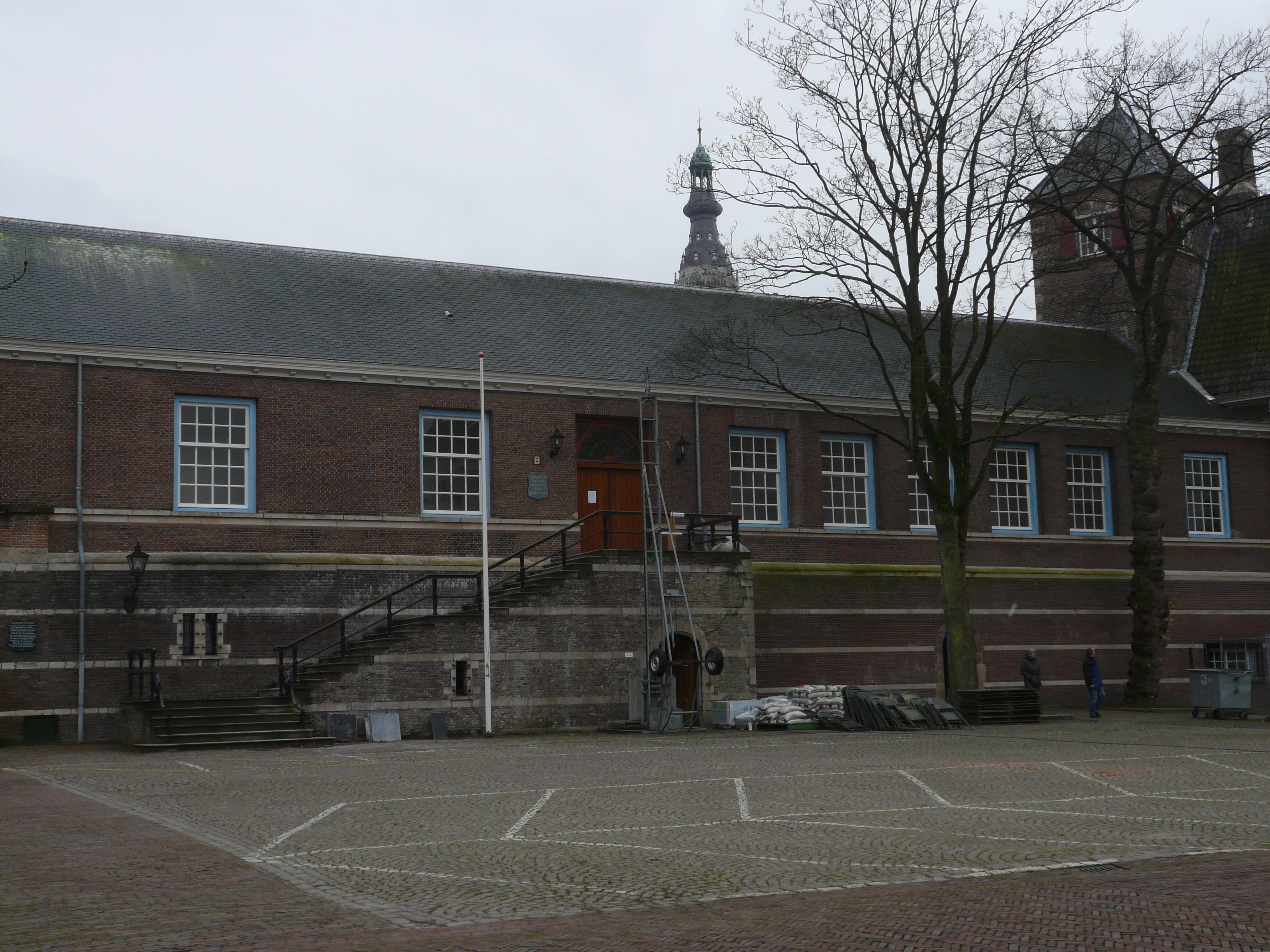 Egmondgalerij van Kasteel van Breda in Breda Centrum in Breda